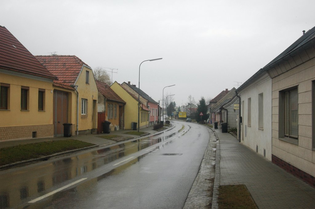 Sierndorf and der March (see Jedenspeigen)